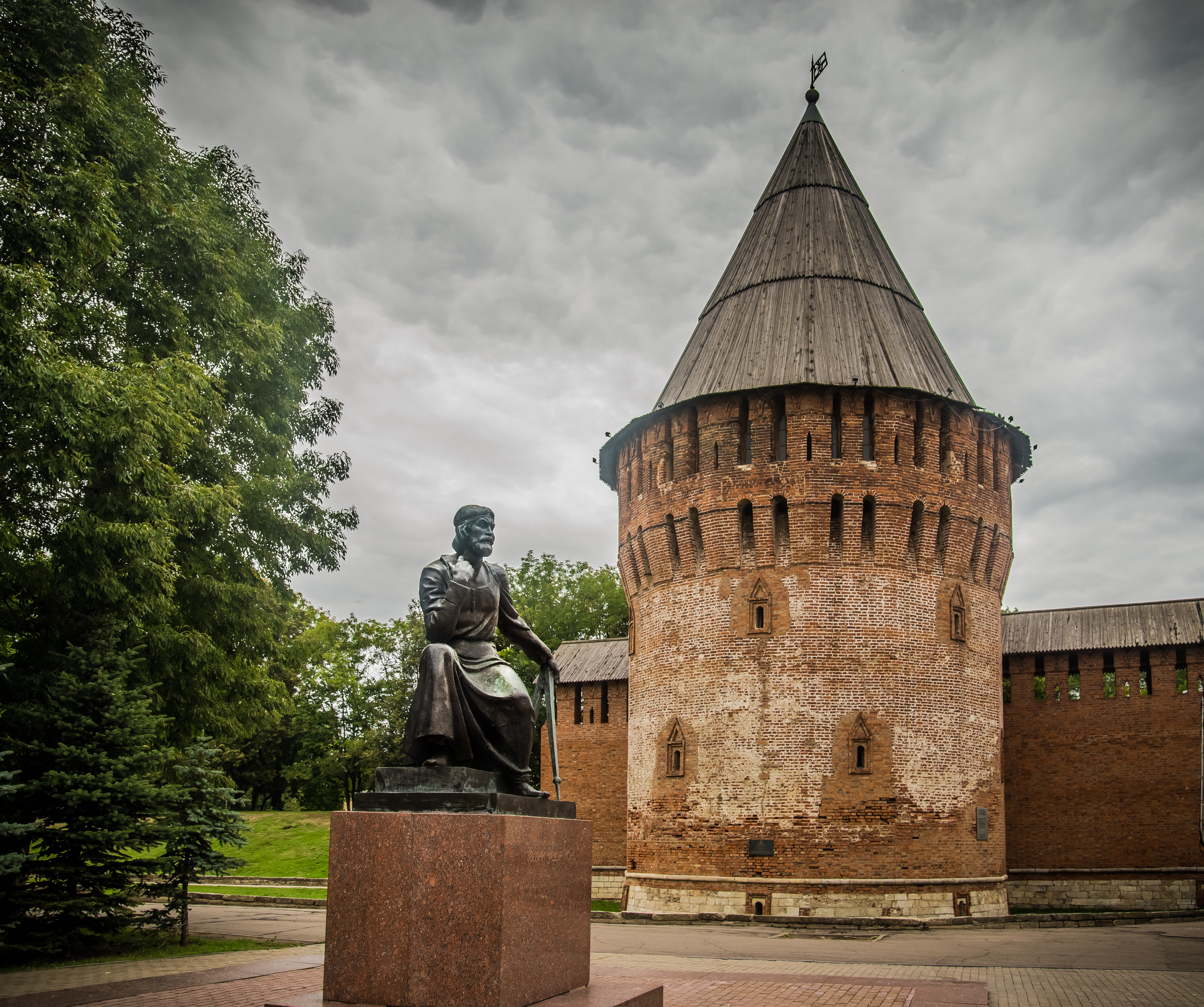 Памятник Коню Ф.: улица Октябрьской революции, Смоленск, Смоленский район, Смоленская область